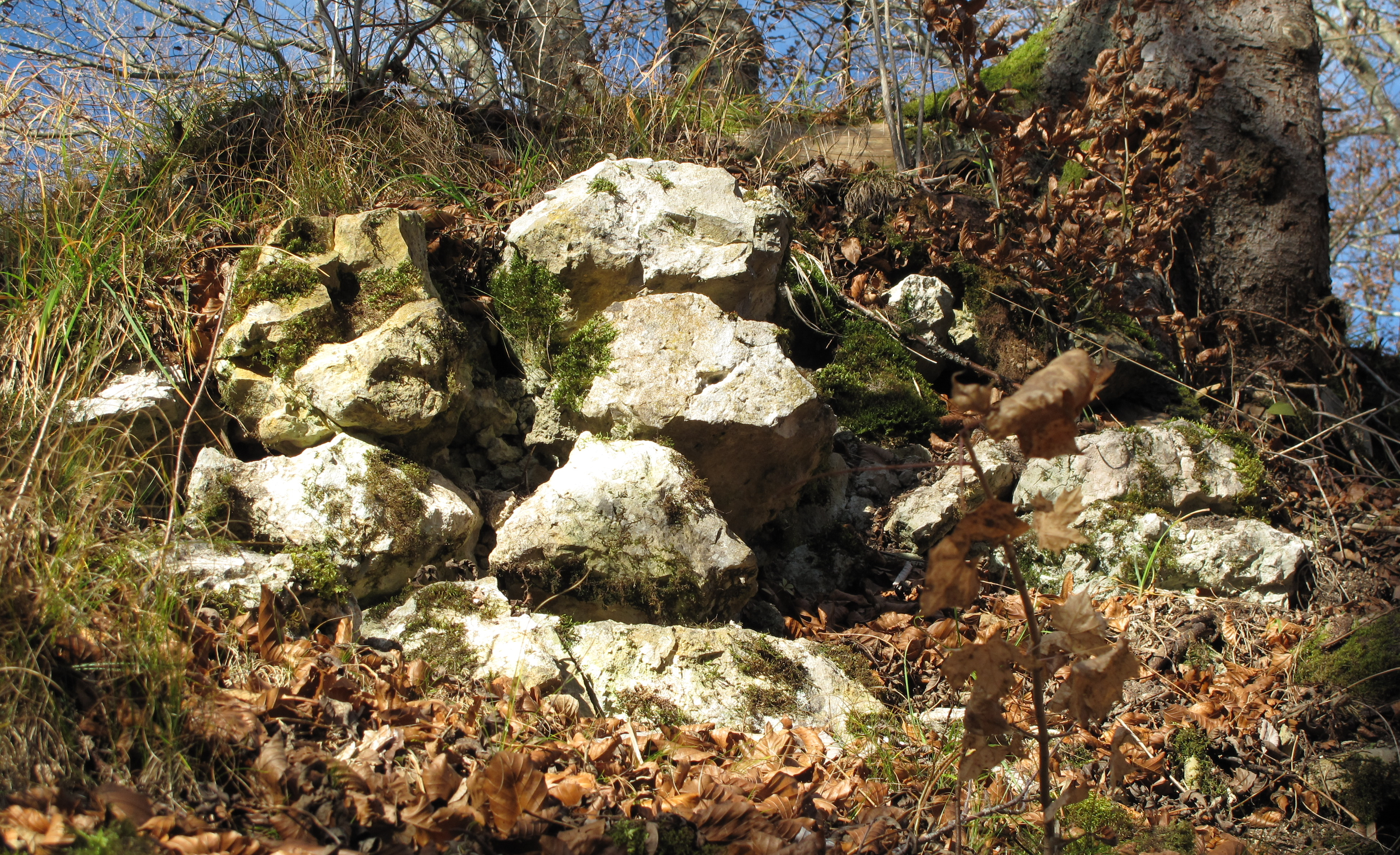 Mauerrest an der Südost-Ecke der Kernburg.